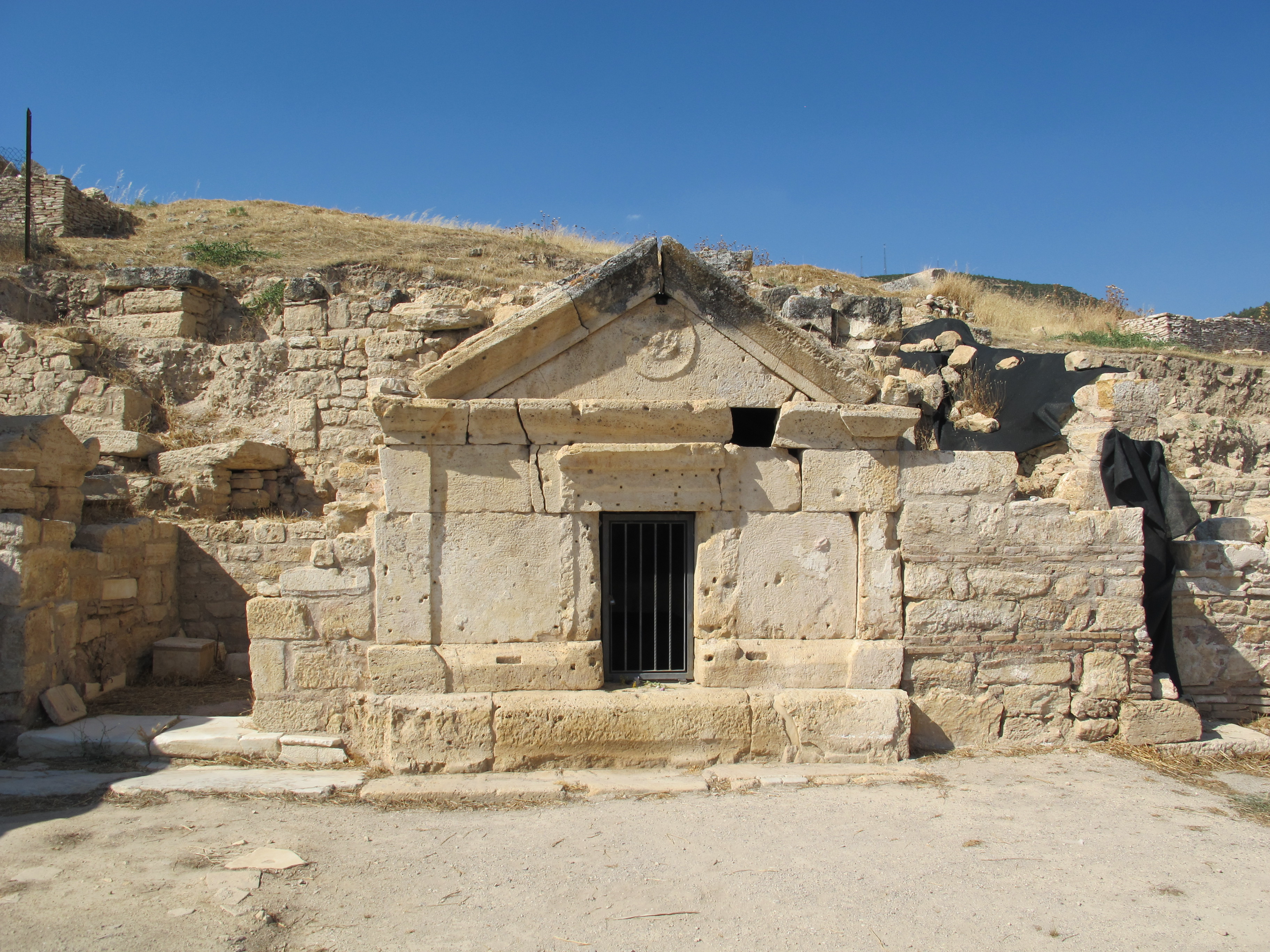 Hyerapolis, martyrion di san filippo, annessi